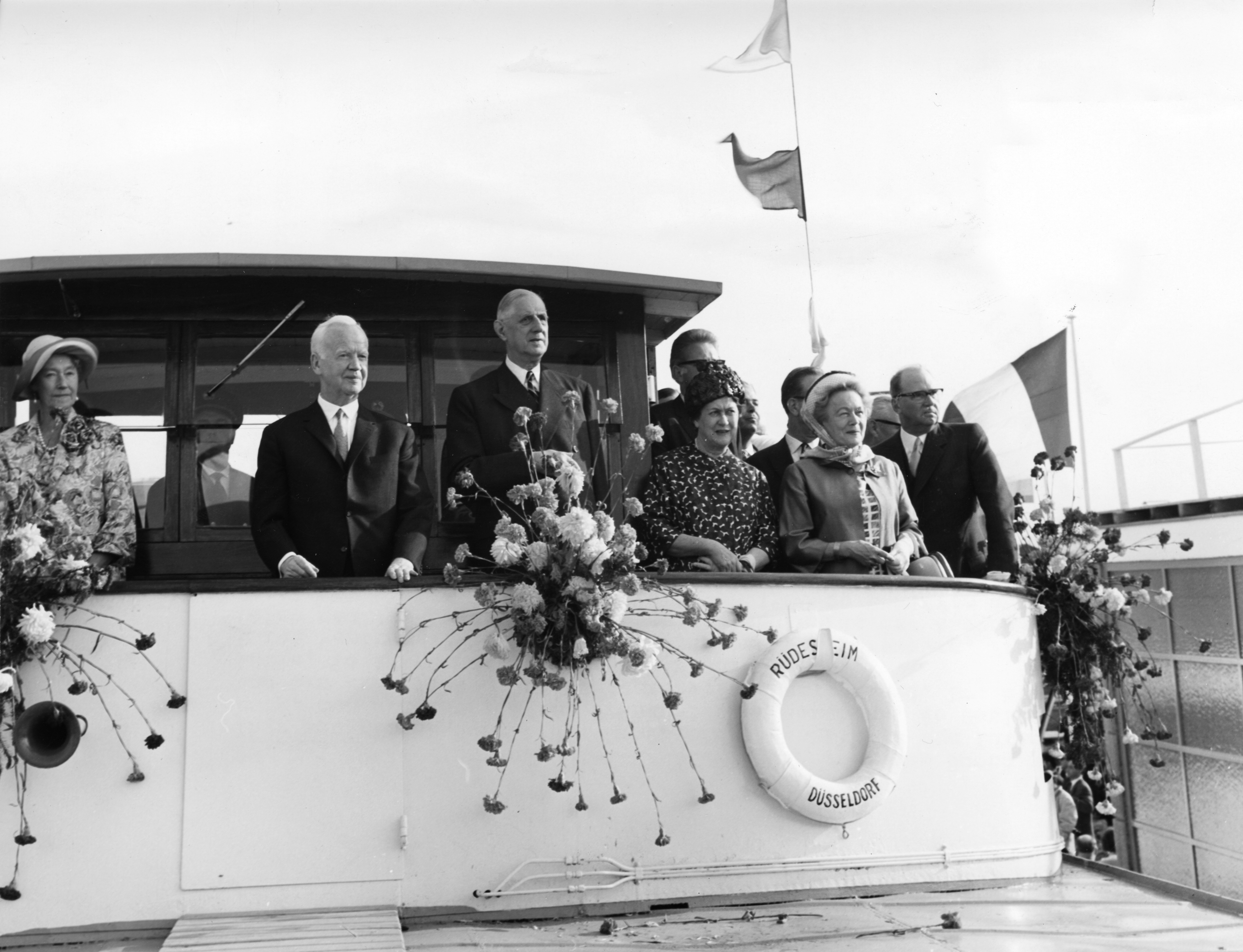 Original caption: "Einweihung des Mosel-Schifffahrtsweges 1964. (Mosel; Staatsoberhäupter; Schleuse Trier) "